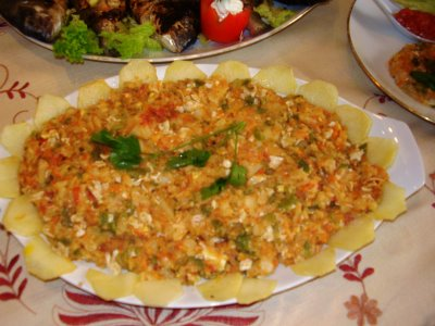 Un plat de kefteji